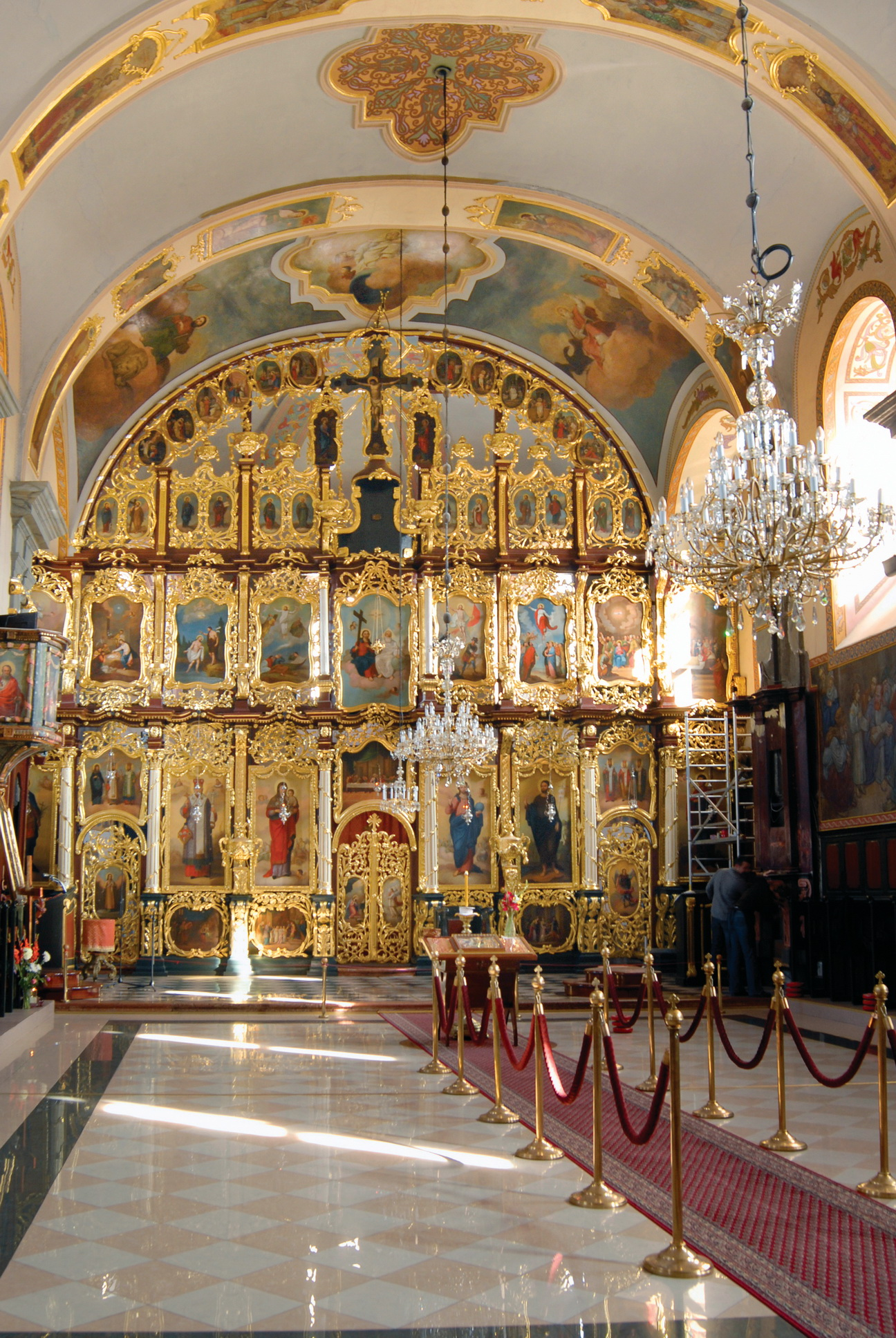 Autor by Snežana Negovanović